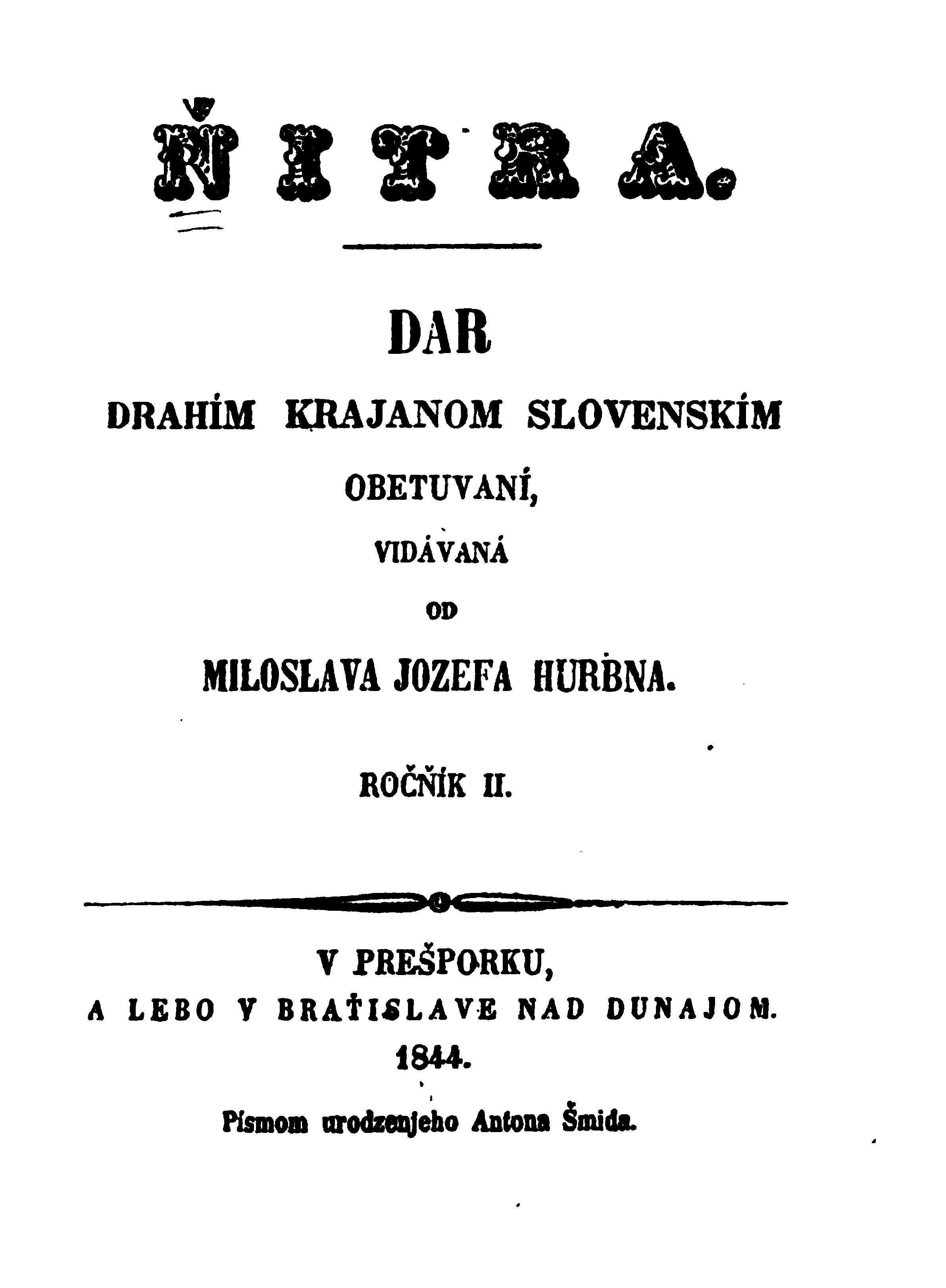 Titulná strana alamanachu Nitra z roku 1844.